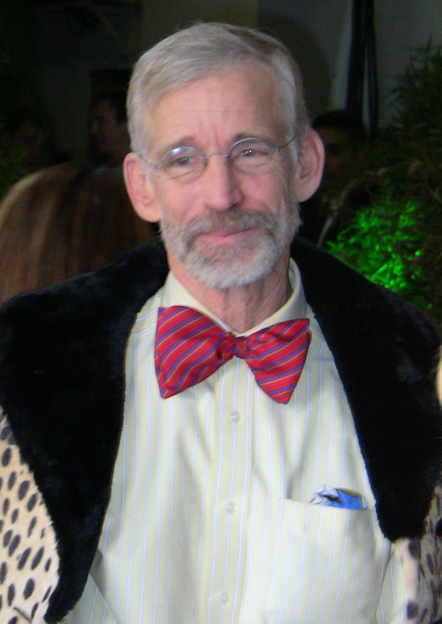 Survivor Finale, CBS Studios, Los Angeles, Calif. - Dec. 14, 2008